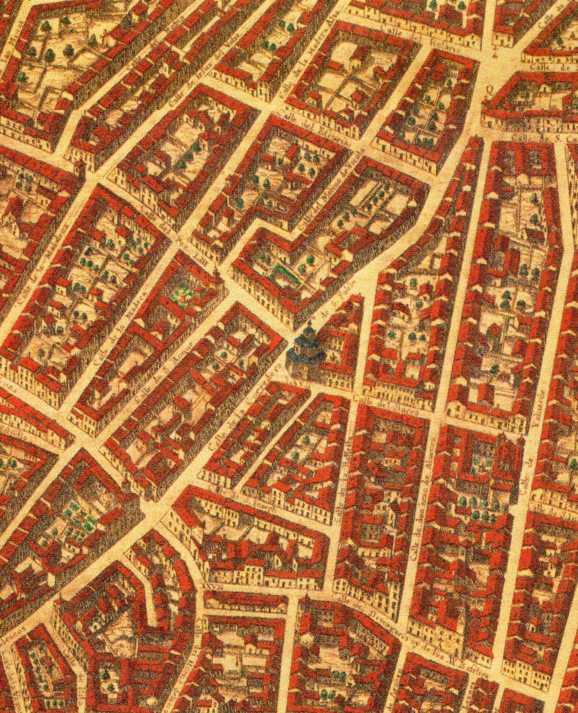 Topografía de la Villa de Madrid descrita por Don Pedro Texeira en 1656, en la cual se demuestran todas las calles al largo y ancho de cada una de ellas, las rinconadas y lo que tuercen las Plazas, fuentes, jardines y huertas con la disposición que tienen las parroquias, Monasterios y Hospitales están señalados sus nombres con letras y números que se hallaran en la tabla y los demás edificios, torres y delanteras de las casas de la parte que mira al Mediodía están sacadas al natural que se podrán tocar las puertas y ventanas de cada una de ellas.